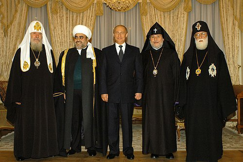 С Патриархом Московским и всея Руси Алексием II, главой мусульман Кавказа шейх-уль-исламом Аллахшукюром Паша-заде, Католикосом всех армян Гарегином II и Патриархом-Католикосом всея Грузии Илией II (слева направо)